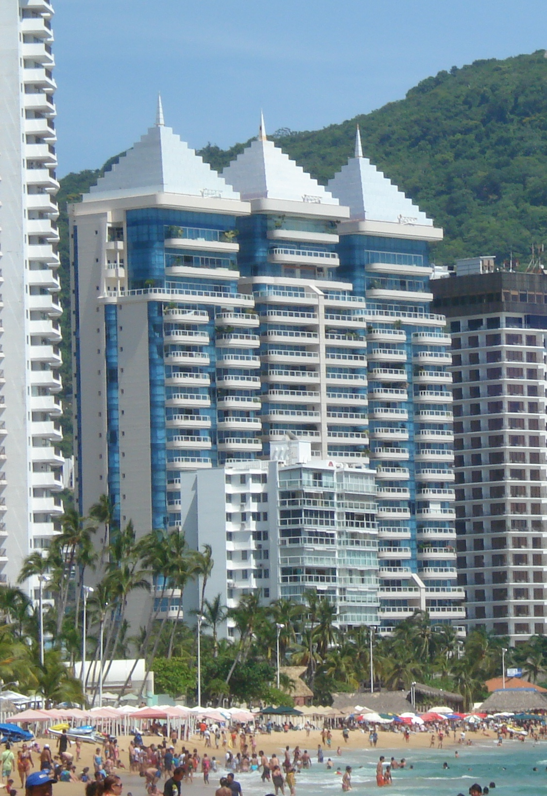 Condominios La Joya 3,2,1 en Acapulco, Guerrero, México.